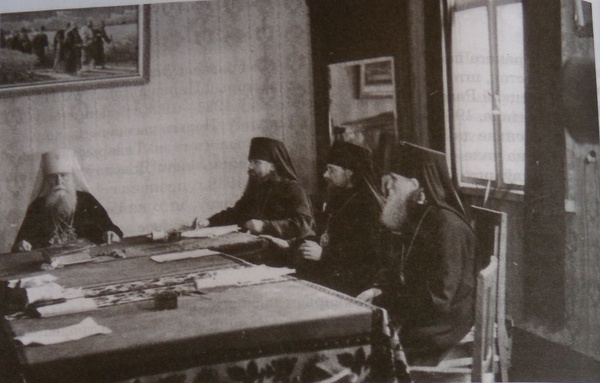 Беларуская (тарашкевіца): Герархі Беларускай аўтакефальнай праваслаўнай царквы: Панцеляймон Ражноўскі (Pancielajmon Ražnoŭski), Філафей Нарко (Fiłafiej Narko), Апанас Мартас (Apanas Martas) і Бэнэдыкт Бабкоўскі (Benedykt Babkoŭski)